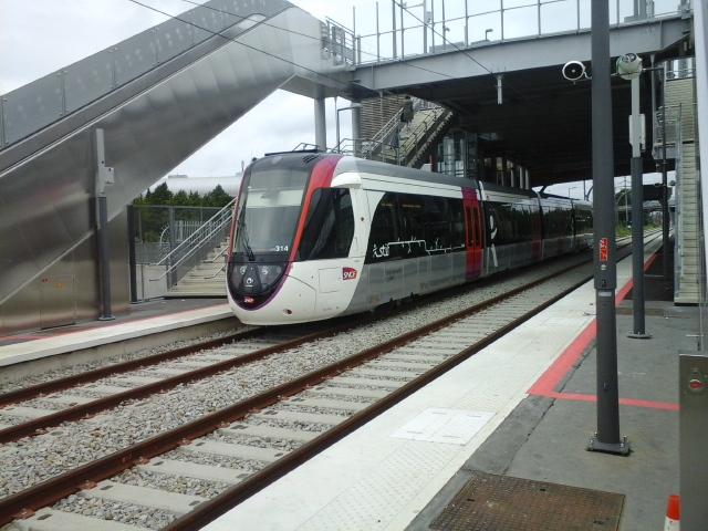 Citadis Dualis en gare de Villetaneuse-Université. On remarquera que les panneaux signalétiques n'avaient pas encore été installés dans cette gare le jour de l'ouverture de la ligne.